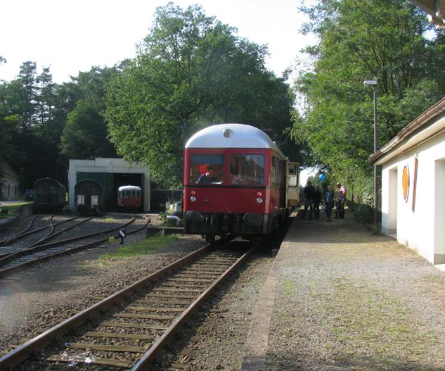 Ein GDT der AVL im Werkbahnhof Bomlitz am Tag der offenen Tür des Industrieparks Walsrode/Bomlitz.